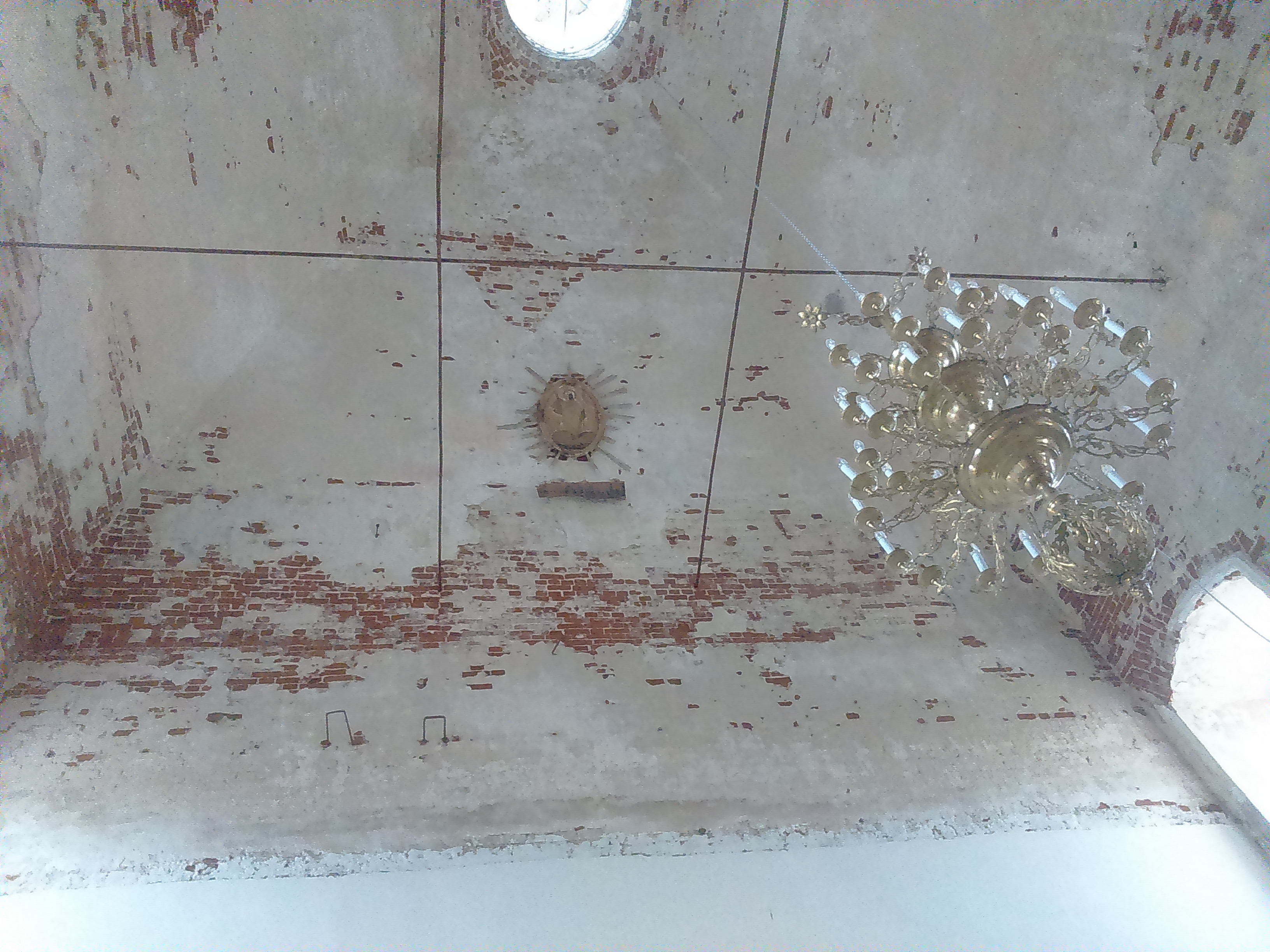 В церкви Пророка Илии в селе Ильинское Селивановского района Владимирской области сохранилась до наших дней икона, венчавшая иконостас.